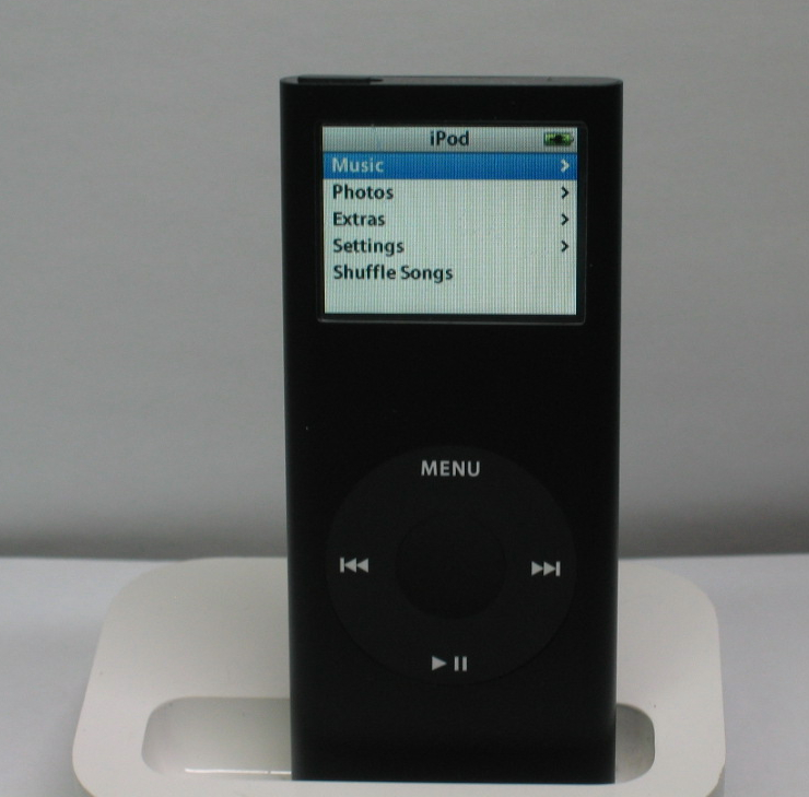 iPod Nano 2G - 8GB Black